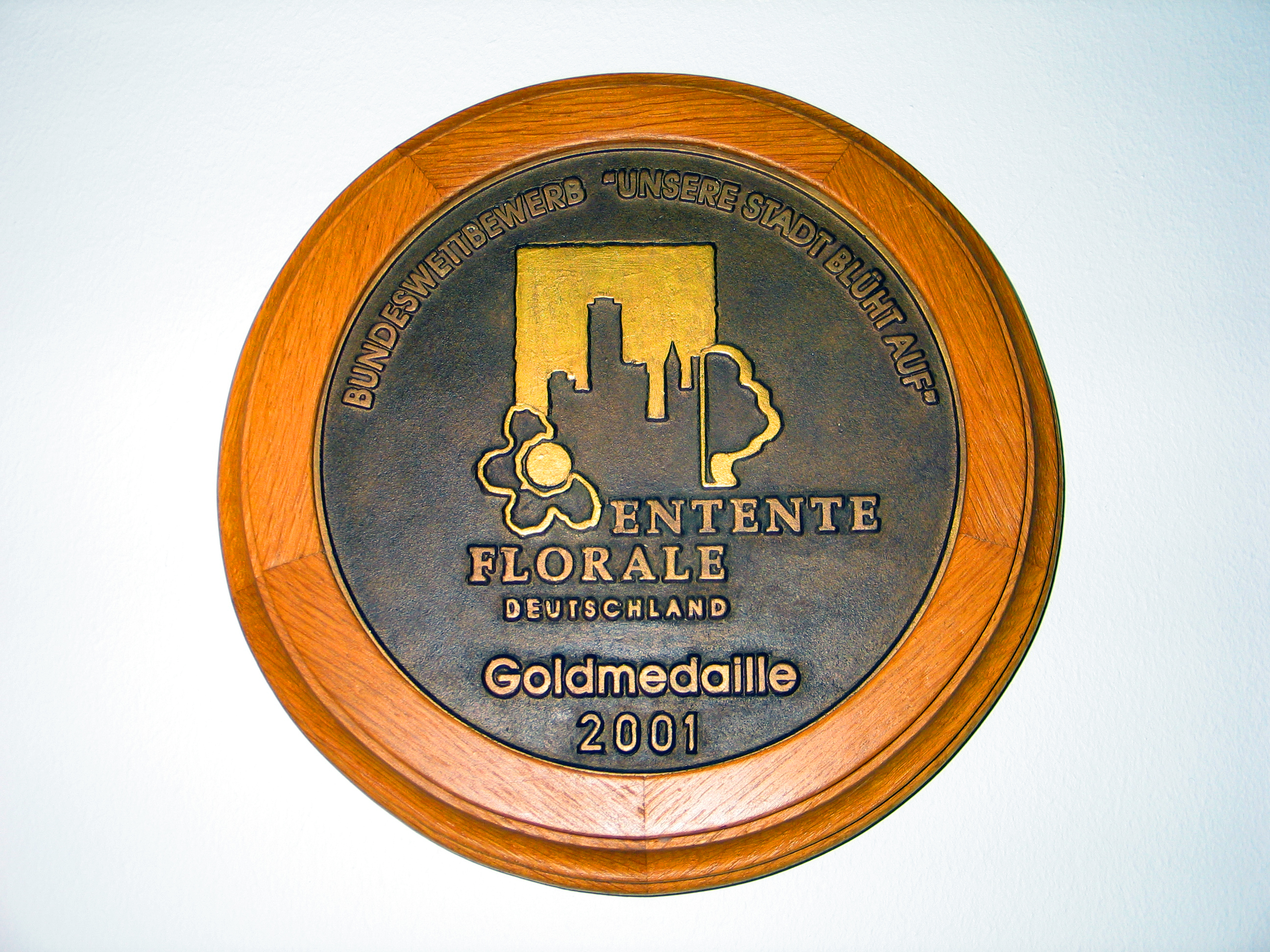 "Goldmedaille" 2001 der Entente Florale Deutschland" für den Bundeswettbewerb Unsere Stadt blüht auf, gesehen im Verwaltungsgebäude vom Waldfriedhof in Celle ...